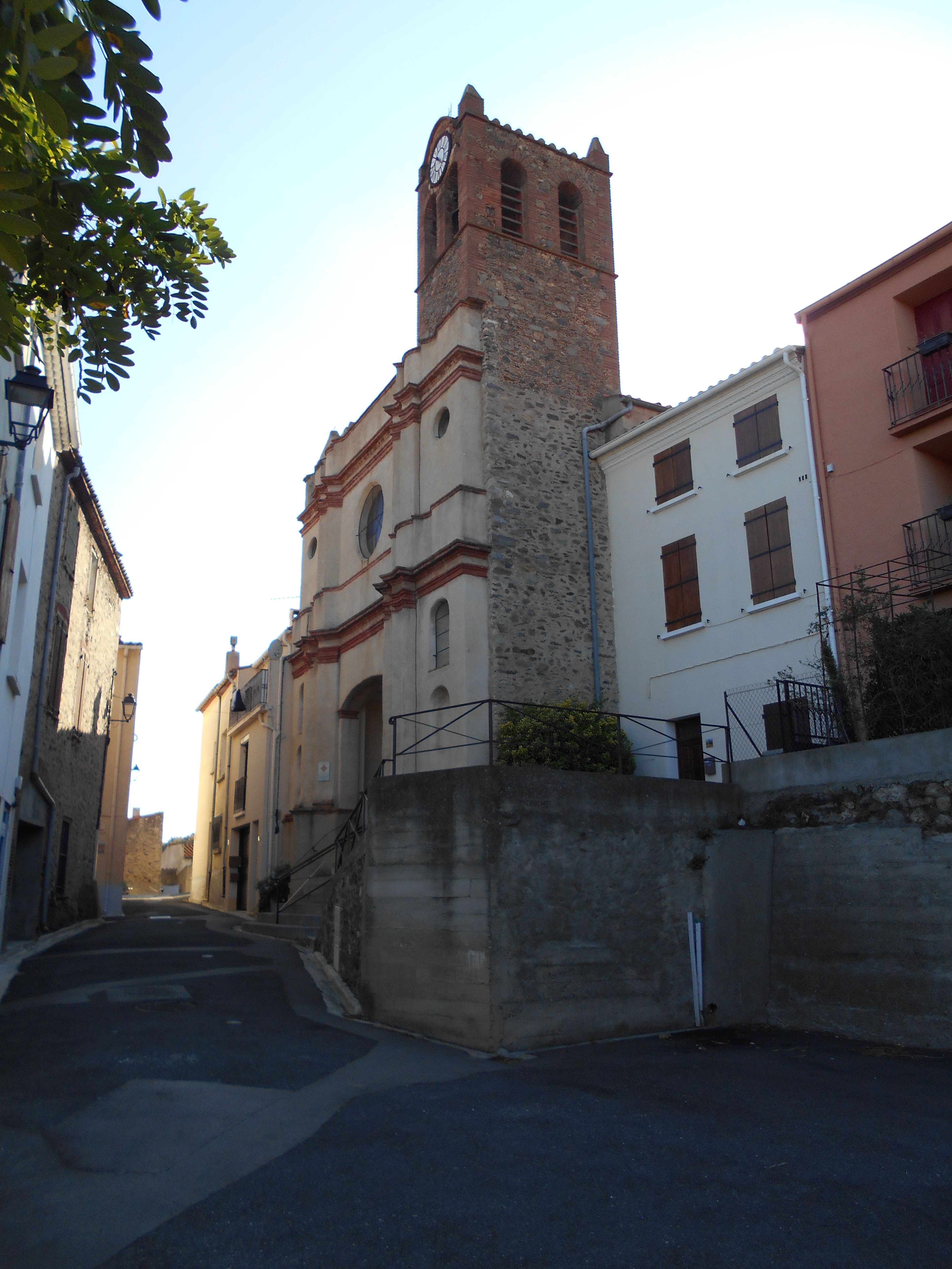 Sanr Joan i Santa Eugènia de Montner